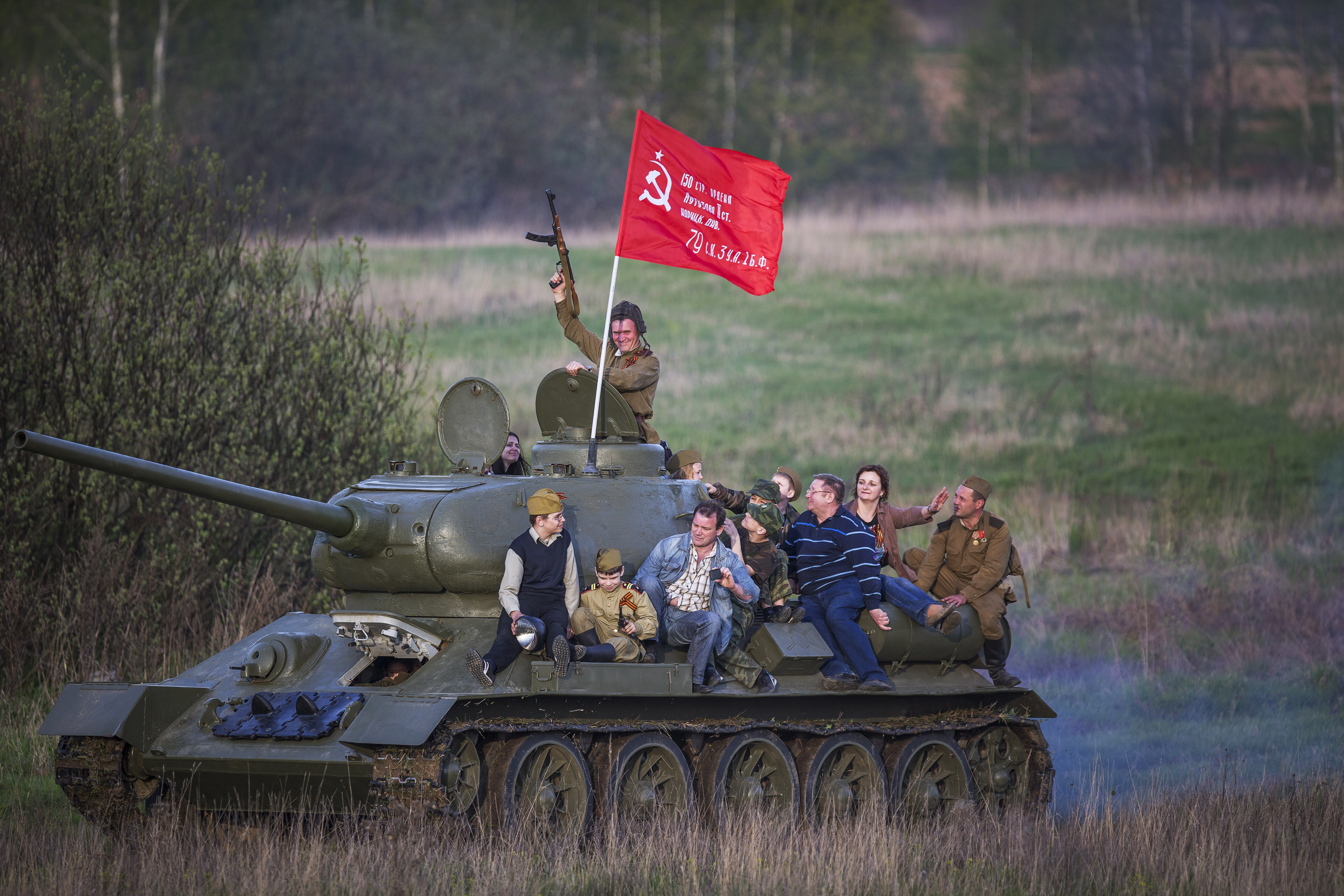 Танк Т-34-85 - снова находу, катает гостей праздника в Музее отечественной военной истории